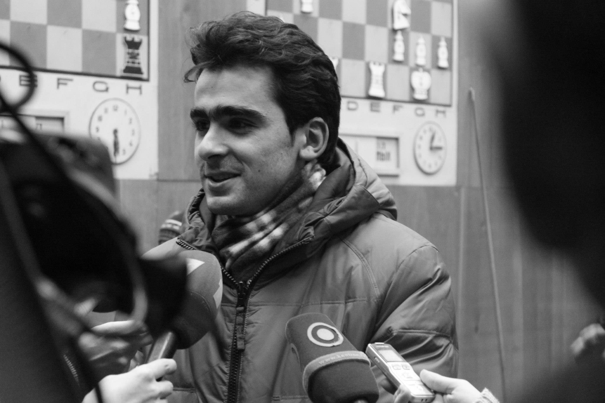 Аветик Григорян